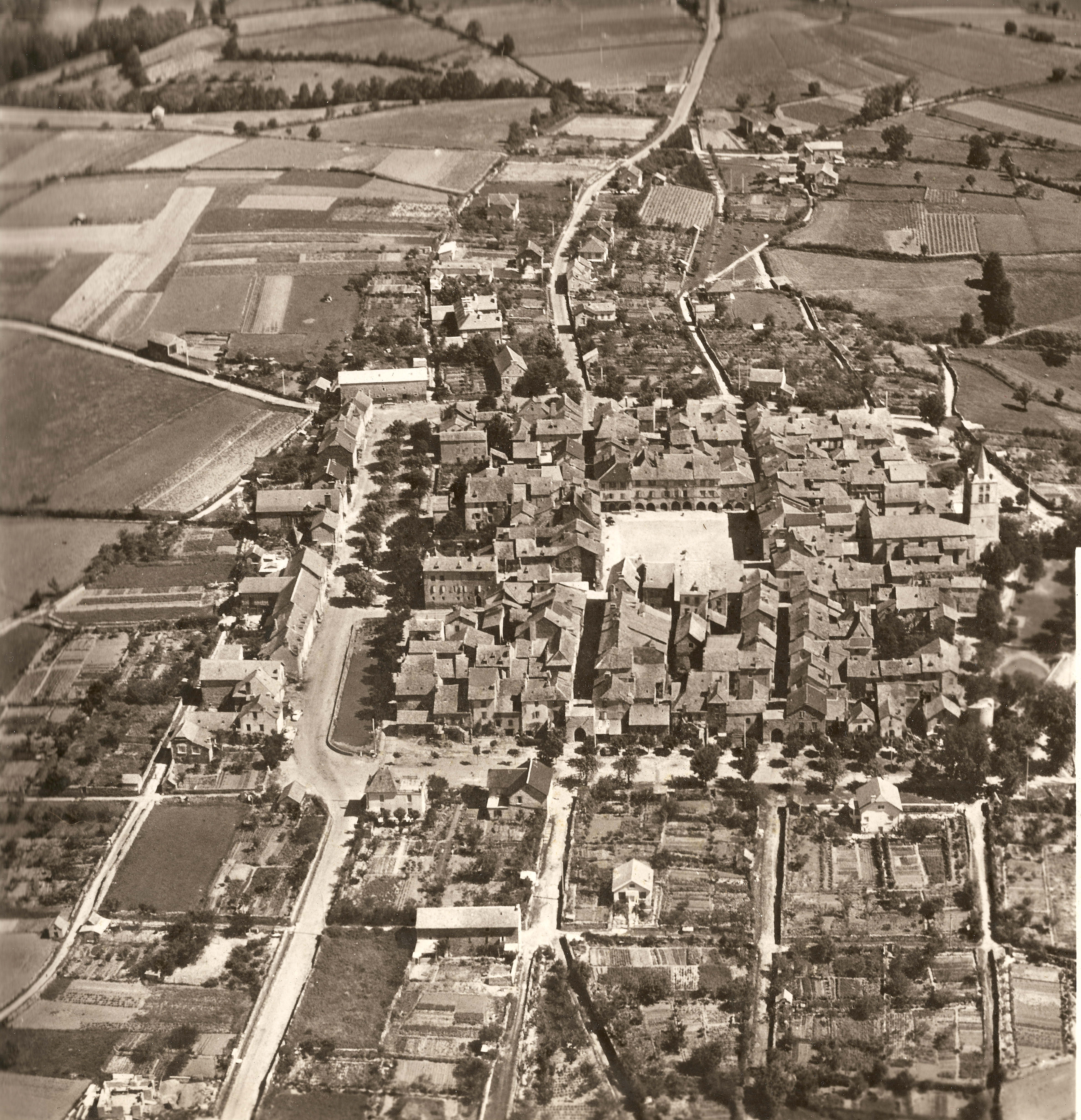 vue aérienne de Sauveterre-de-Rouergue, fin des années 1950